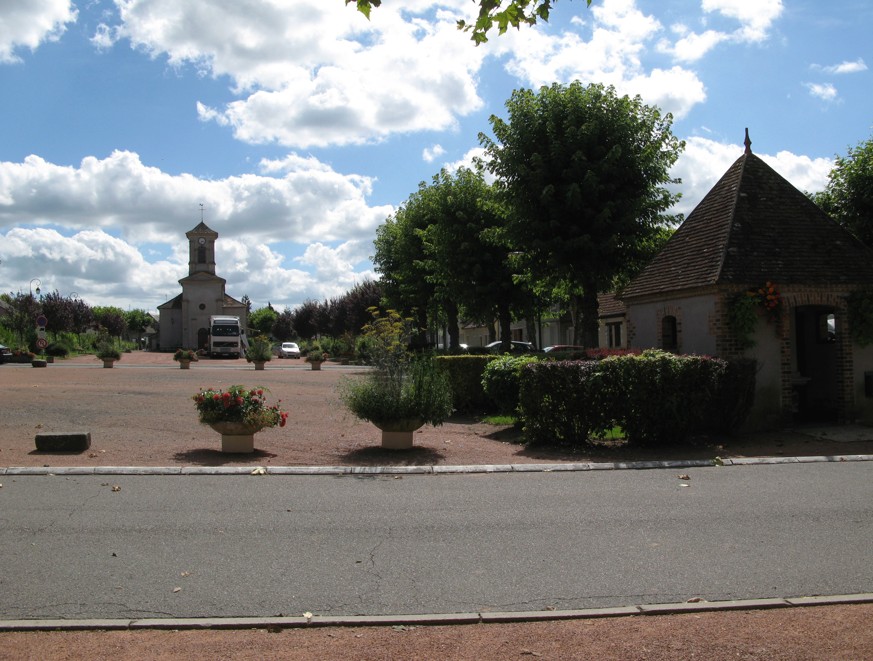 Fours (Nièvre, France) - Place centrale. . .